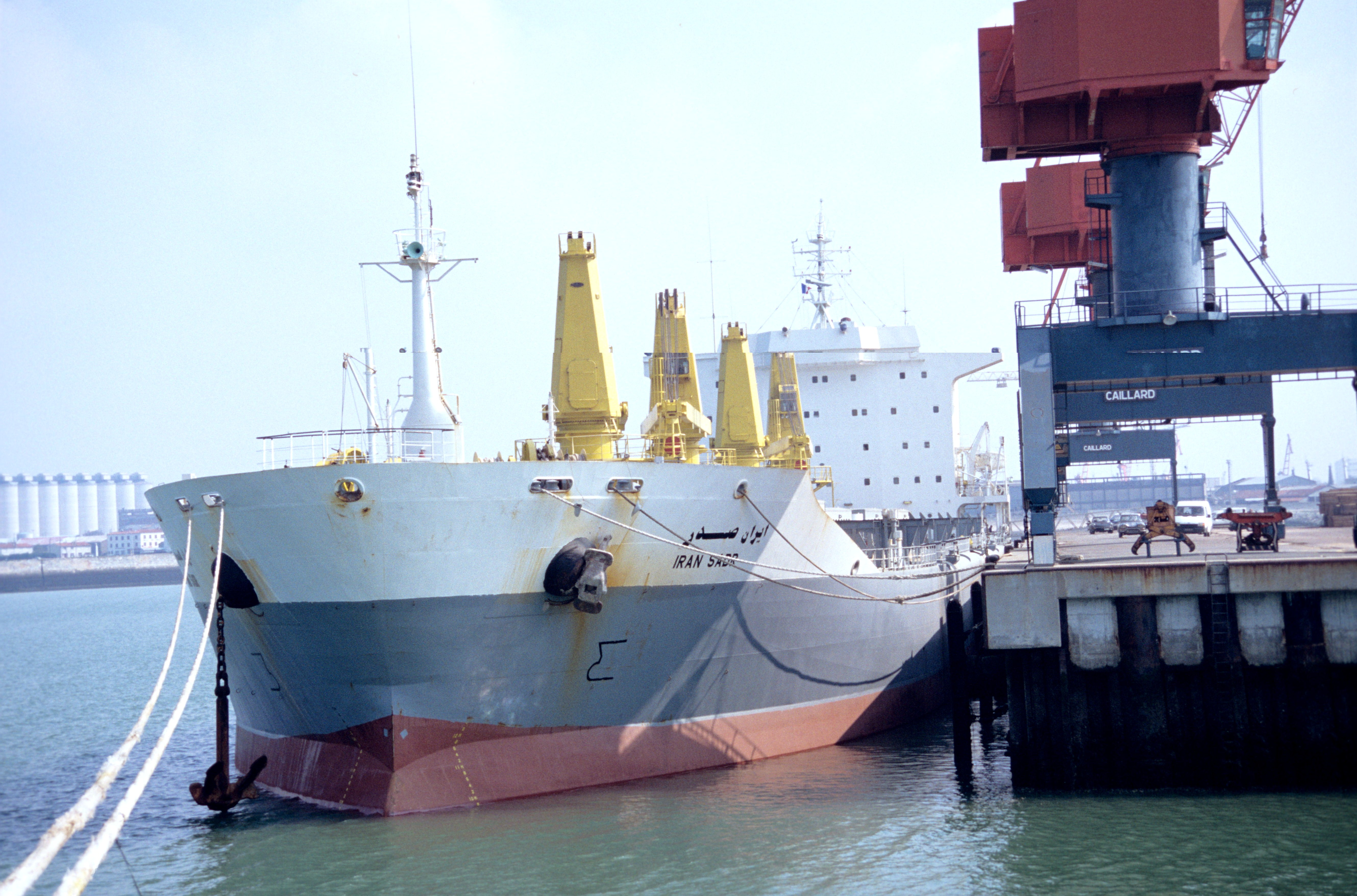 Le navire cargo iranien "Iran Sadr" en escale au port de La Pallice. Ce navire est un vraquier (bulk carrier) contruit en Corée par Daewoo et lancé en 1985. Il appartient (2009) à la compagnie de navigation Islamic Republic of Iran Shipping Lines. IMO 8320121. En persan, "Iran Sadr" s' écrit ایران صدر. Port de commerce de La Rochelle-Pallice, La Rochelle, Charente Maritime, France.